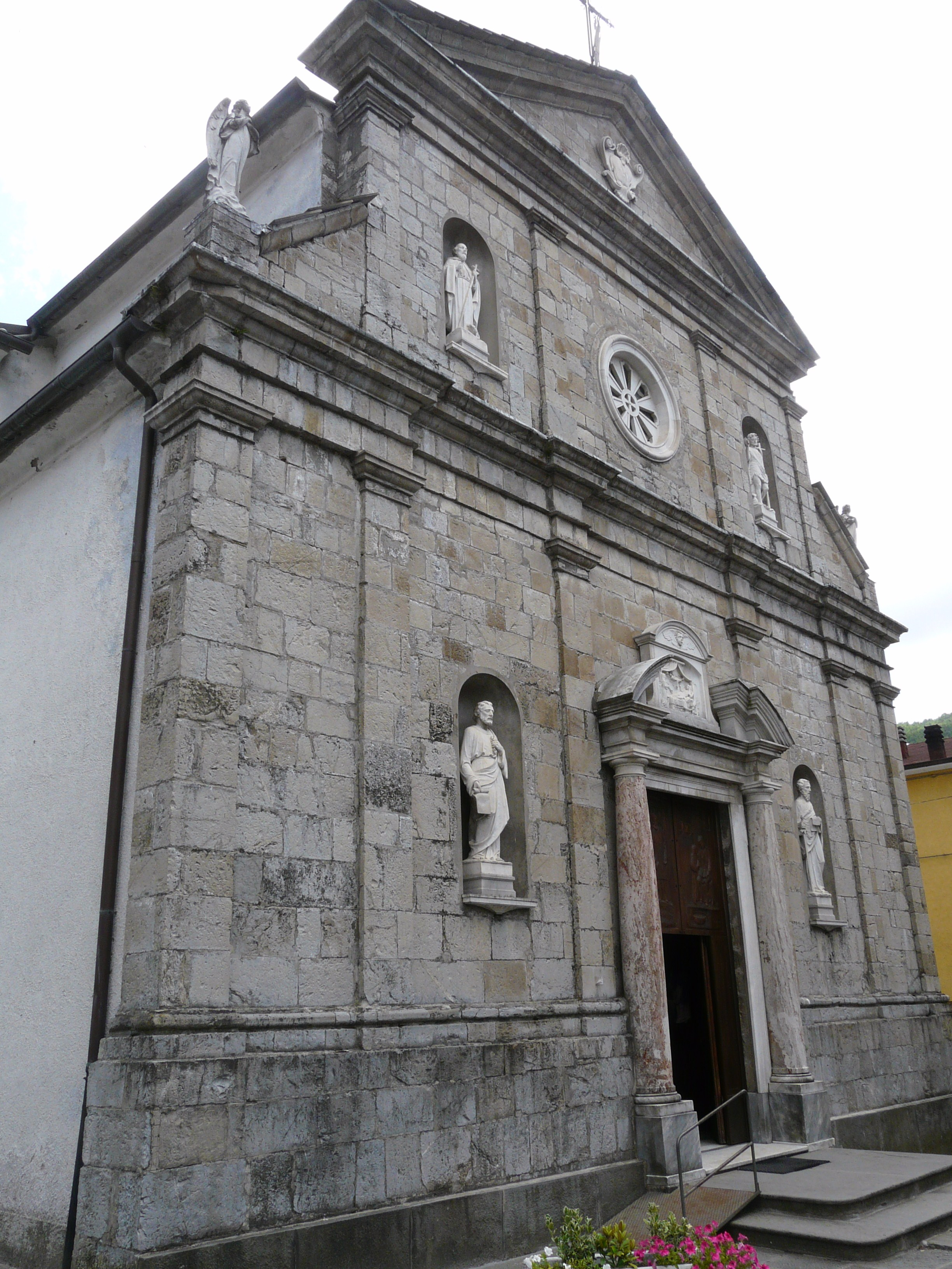 La chiesa di Santa Maria, Santa Maria del Taro, Tornolo, Emilia-Romagna, Italia